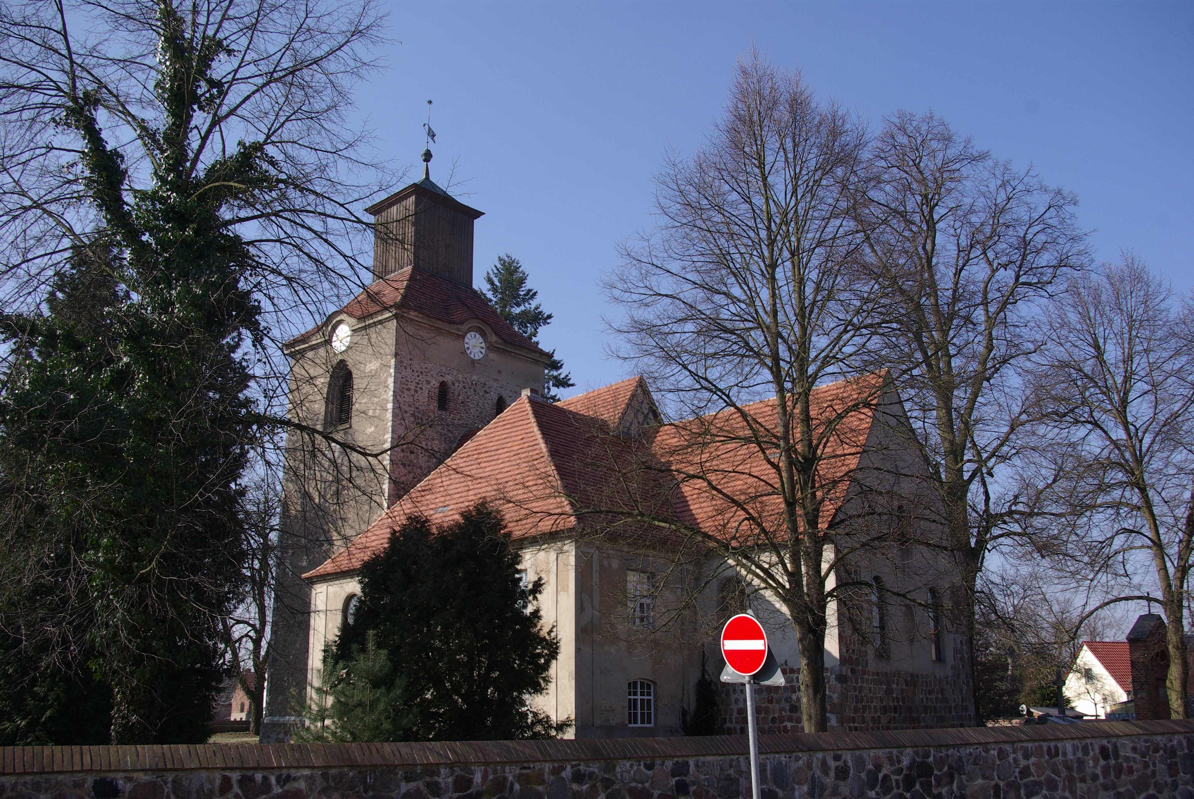 Steinhöfel in Brandenburg. Die Kirche stammt im Ursprung aus dem 13. Jahrhundert. Die Kirche steht unter Denkmalschutz.